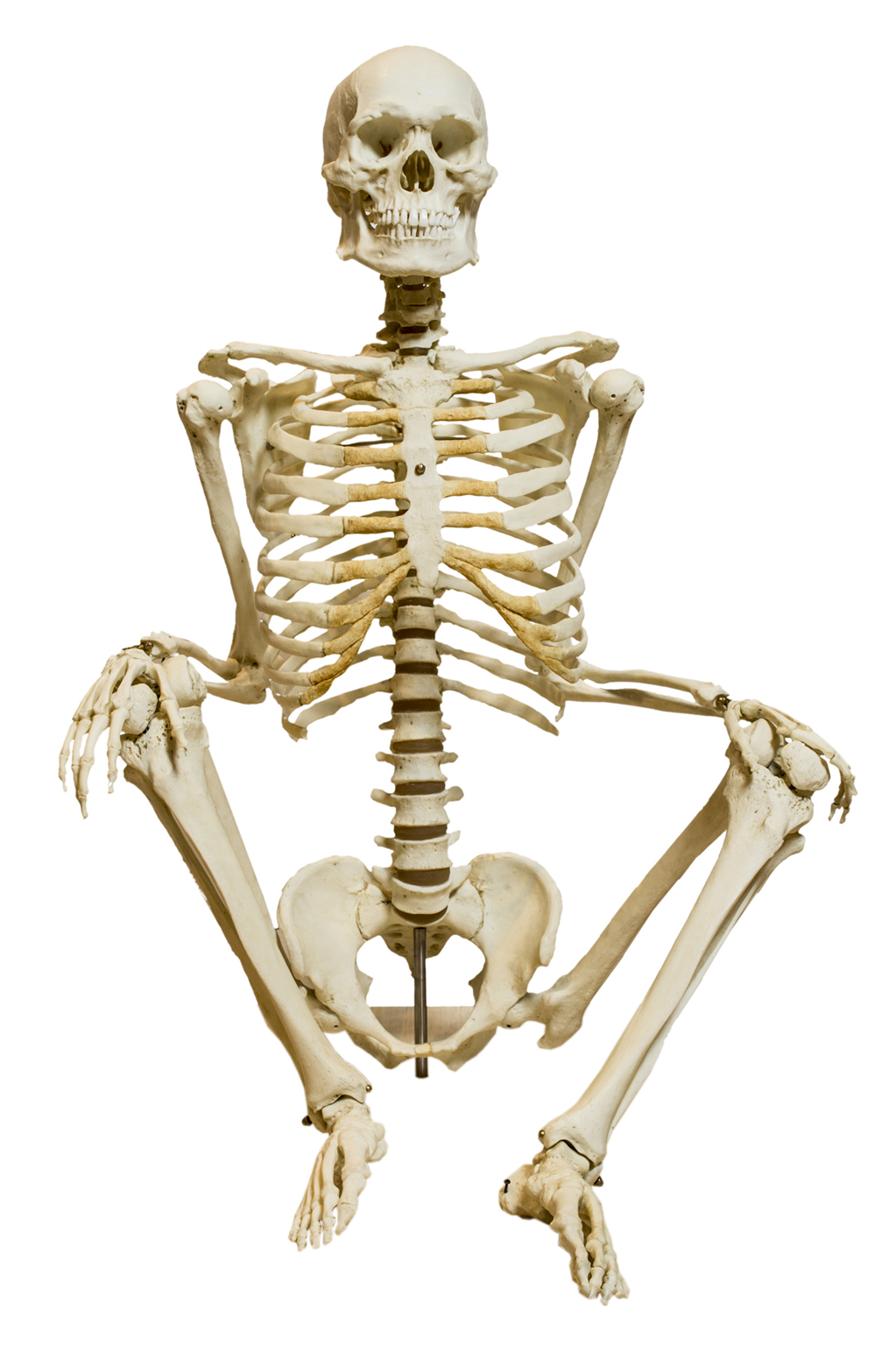 Scheletro di Homo sapiens. Replica.